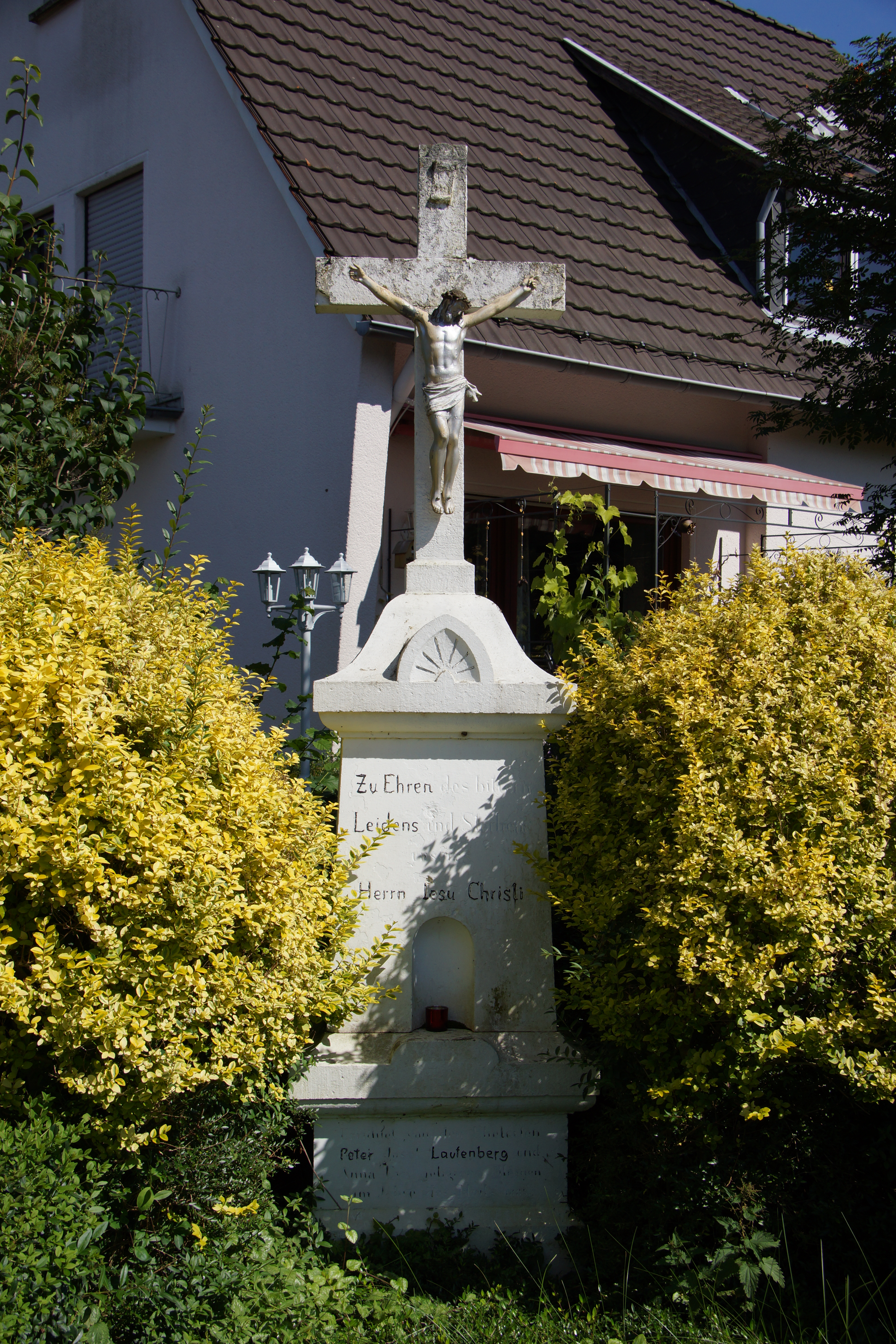 Weißes Kreuz (1883) in Rauschendorf, Königswinter